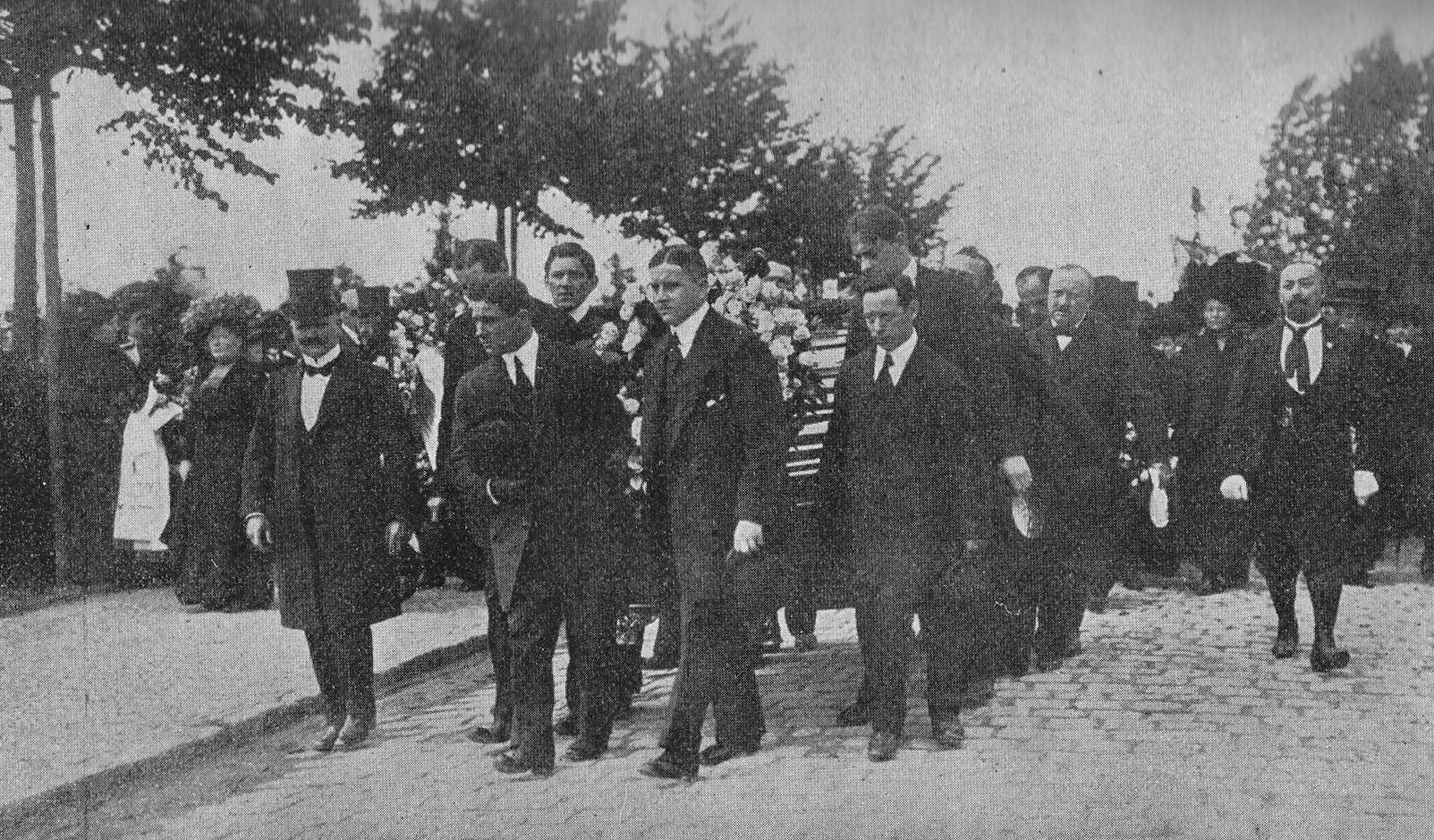 Trauerzug für Fritz Theile, deutscher Radrennfahrer